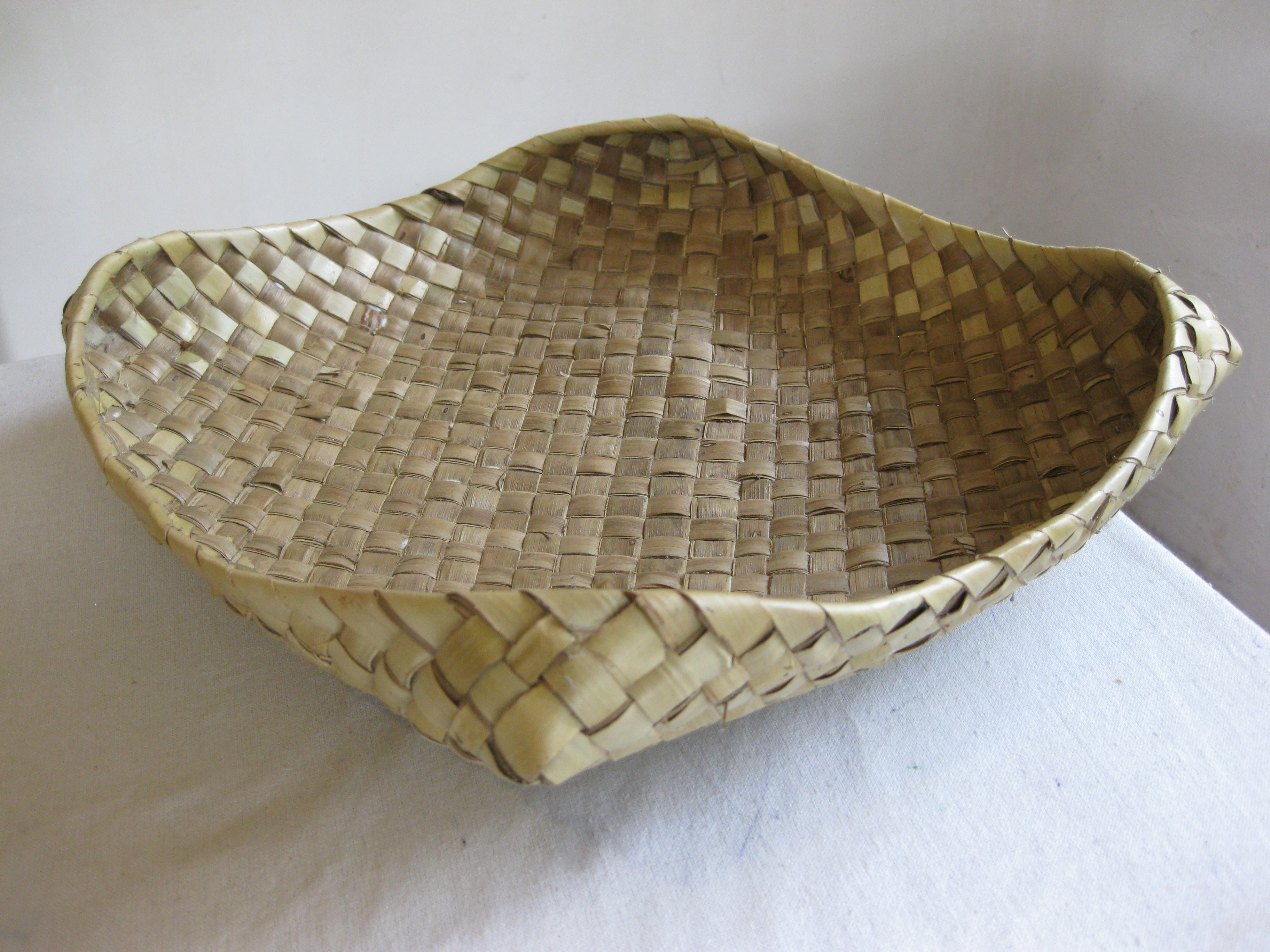 සිංහල: පොල් කොළ වලින් වියා තල් කොළවලින් වැර ගන්වන ලද වට්ටිය.